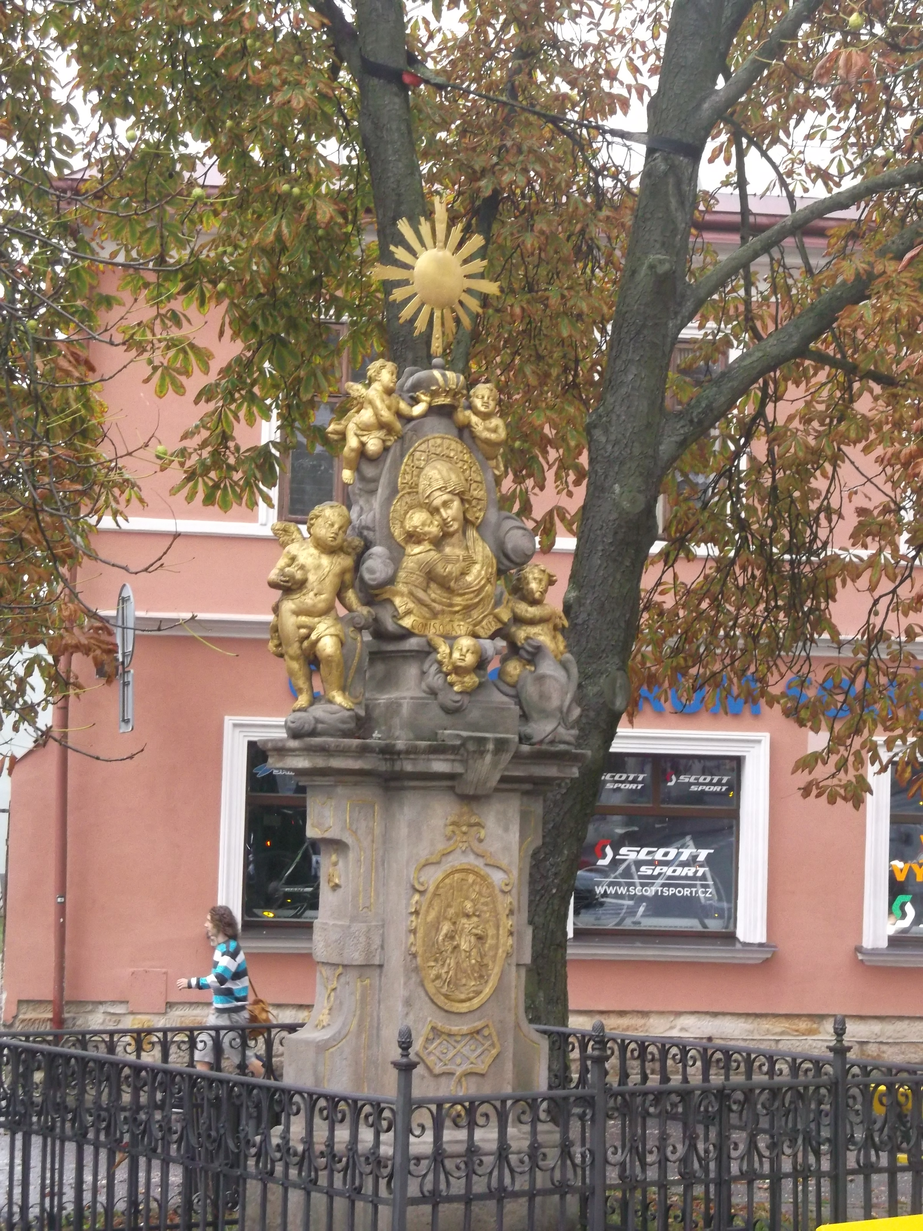 Socha Panny Marie Rušánské - pomník, Komenského náměstí, Nové Město (Jičín).